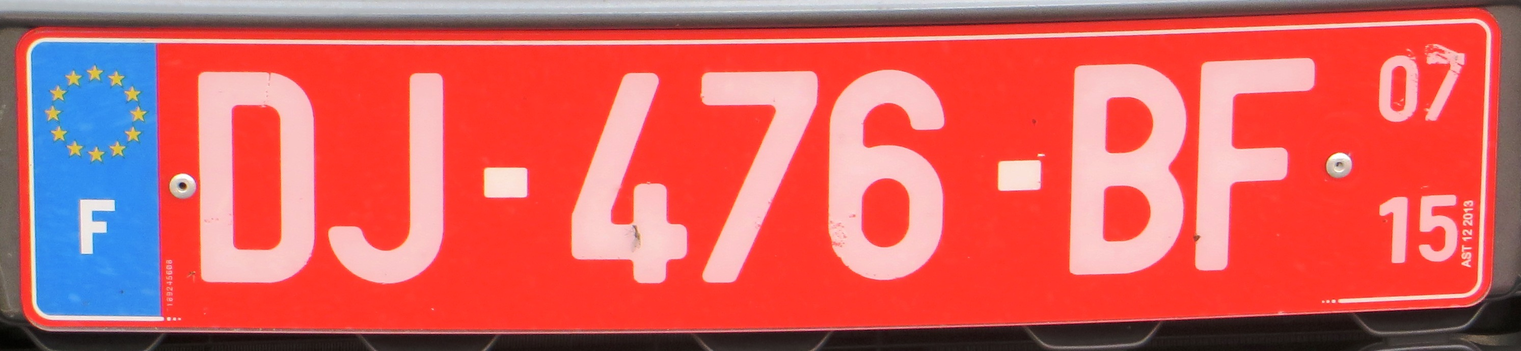 tijdelijke Franse plaat